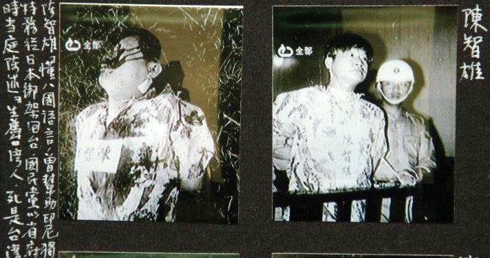 中文（台灣）: 1916 - 1963.5.28